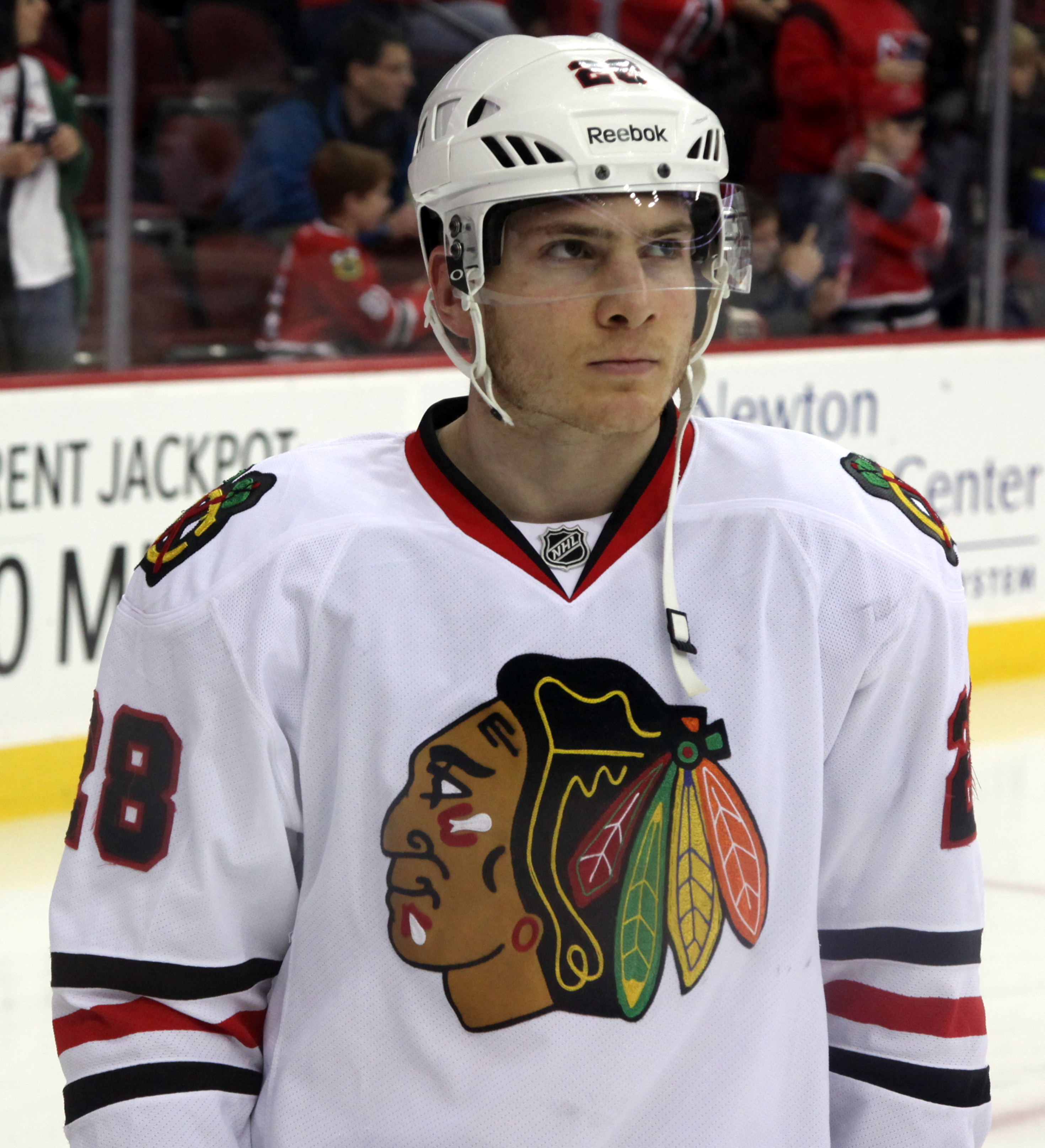 Ben Smith in December 2014.